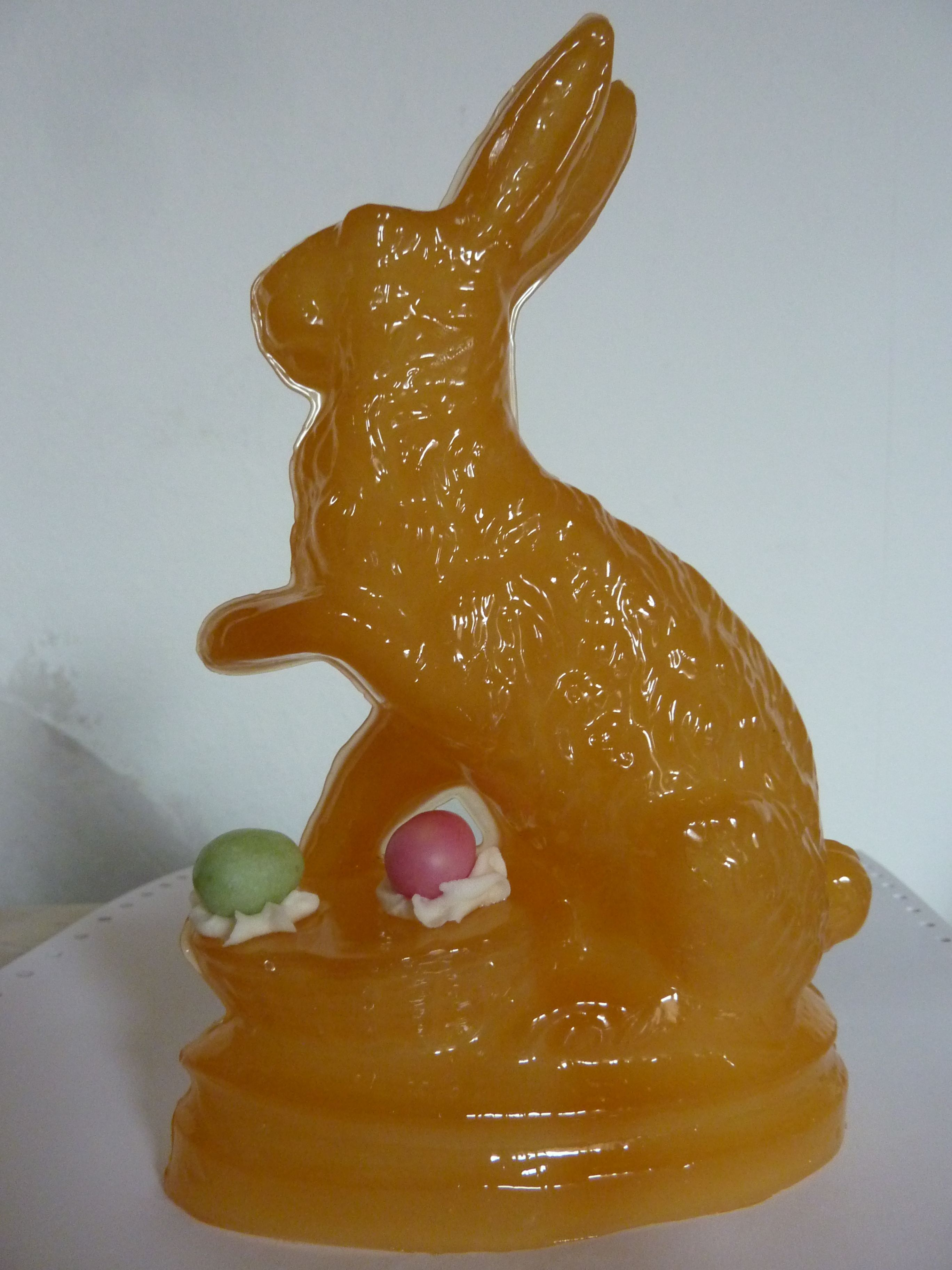 Rahmhase